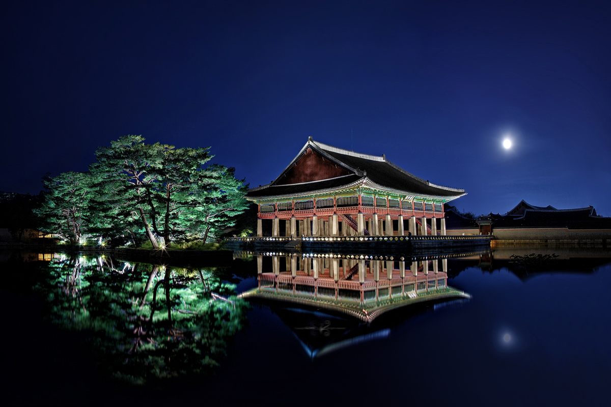 대한민국 국보 제224 경회루의 야경입니다.